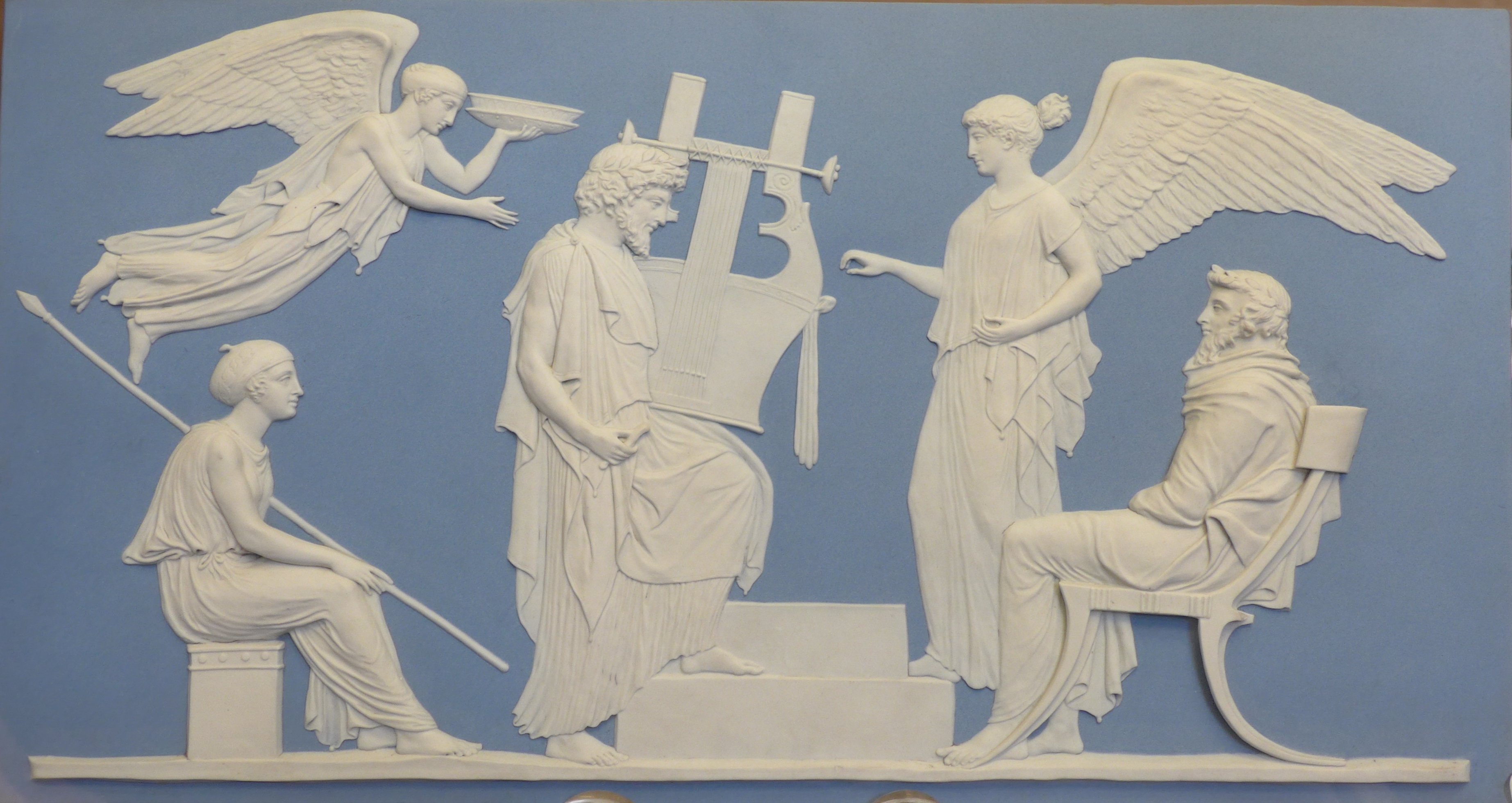 Die Apotheose Homers. Reliefplatte nach Entwurf von J. Flaxman, 1786. Jasperware, Wedgwood, Staffordshire, Etruria. British Museum, Inv. Nr. MLA 1909, 12-1, 186